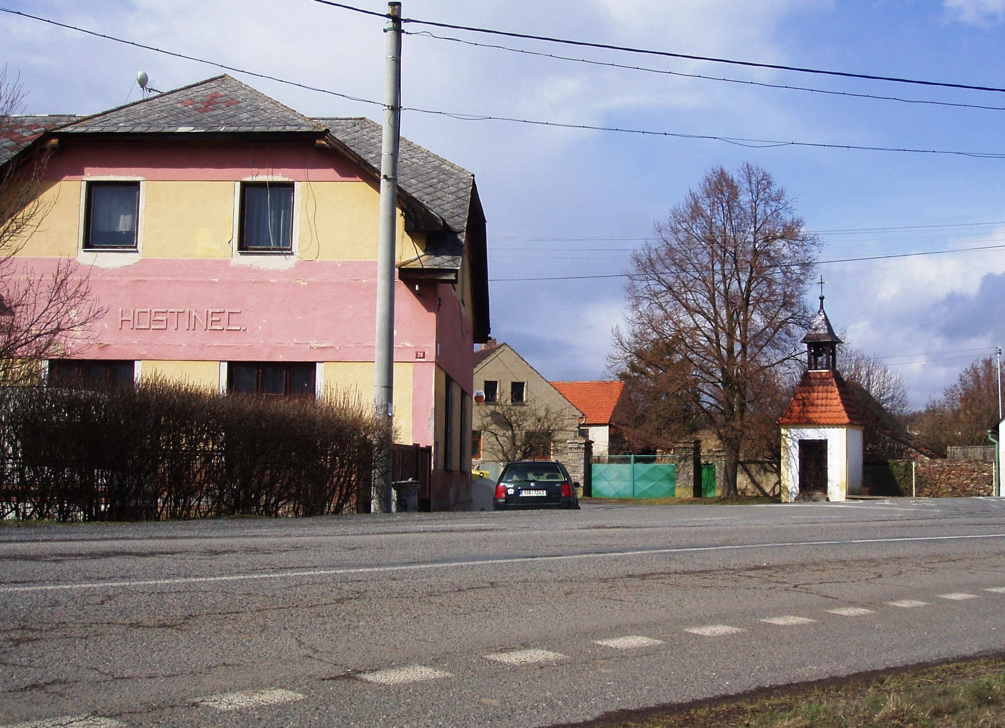 Ostrov - Hostinec s kaplí